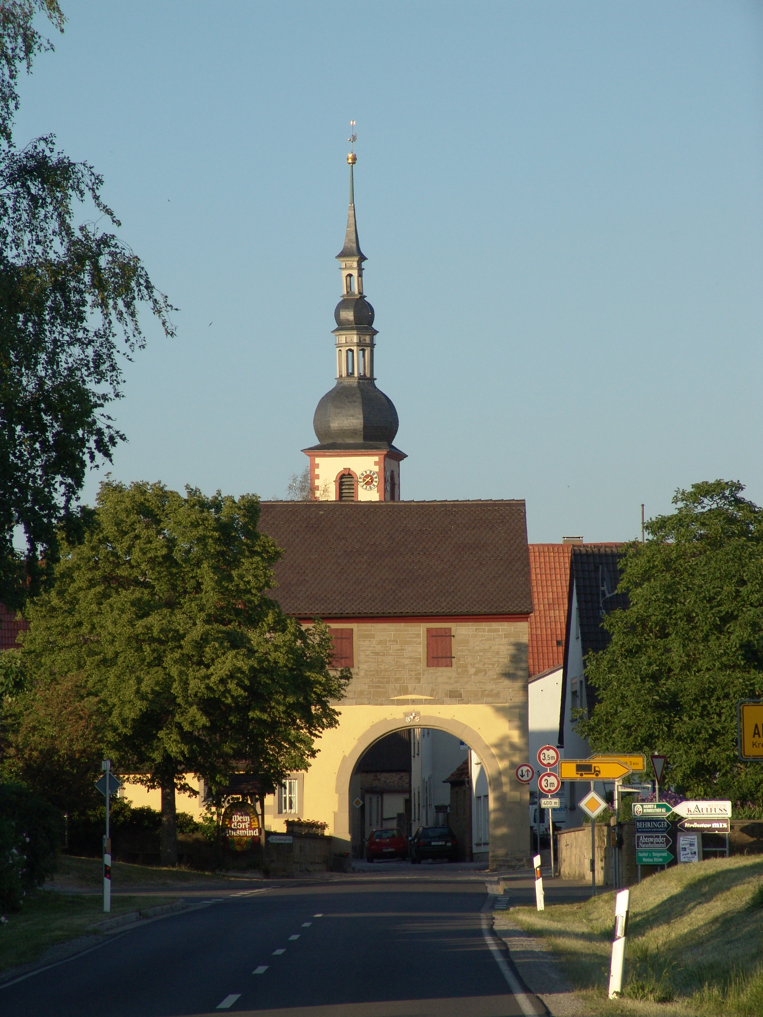 evang.-luth. Kirche Pfarrkirche in Abtswind hinter dem Tor der Ortsbefestigung